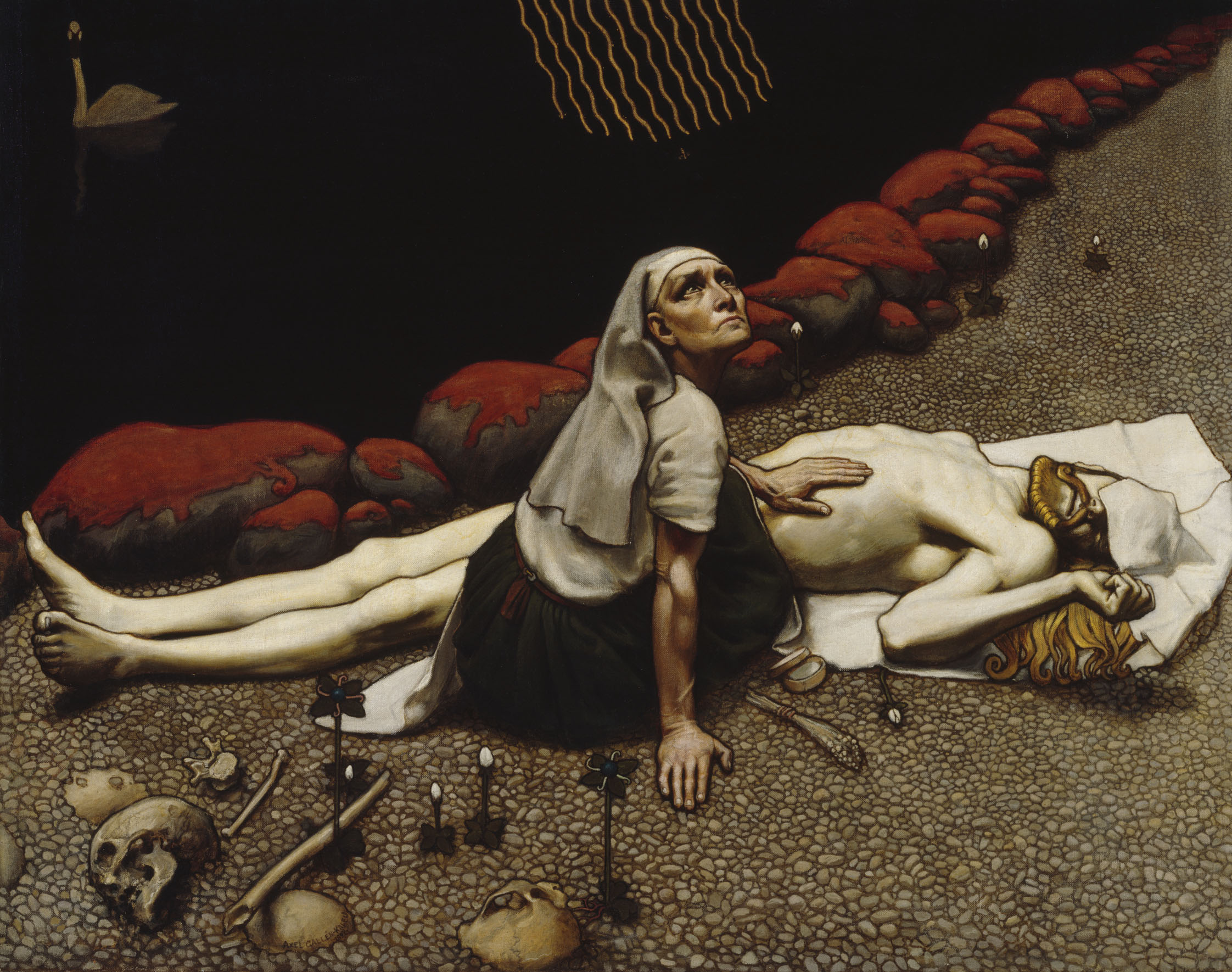 cygnus up left